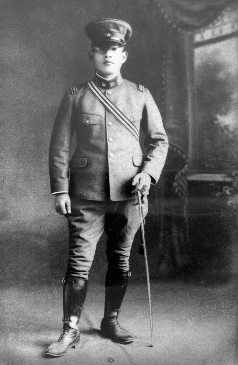 歩兵第80連隊附中尉時代の磯部。